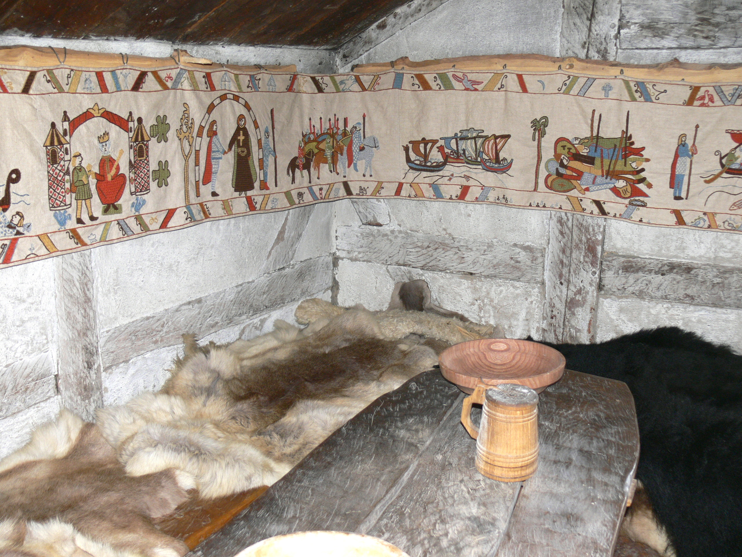 Wikinger Museum Foteviken in Skanör. Schlafstelle mit Wandbehang